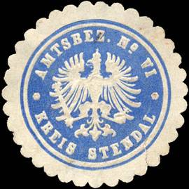 Sealing stamp Title: Amtsbezirk No. VI - Kreis Stendal Description: blau, weiß, geprägt Place: size: 3 cm